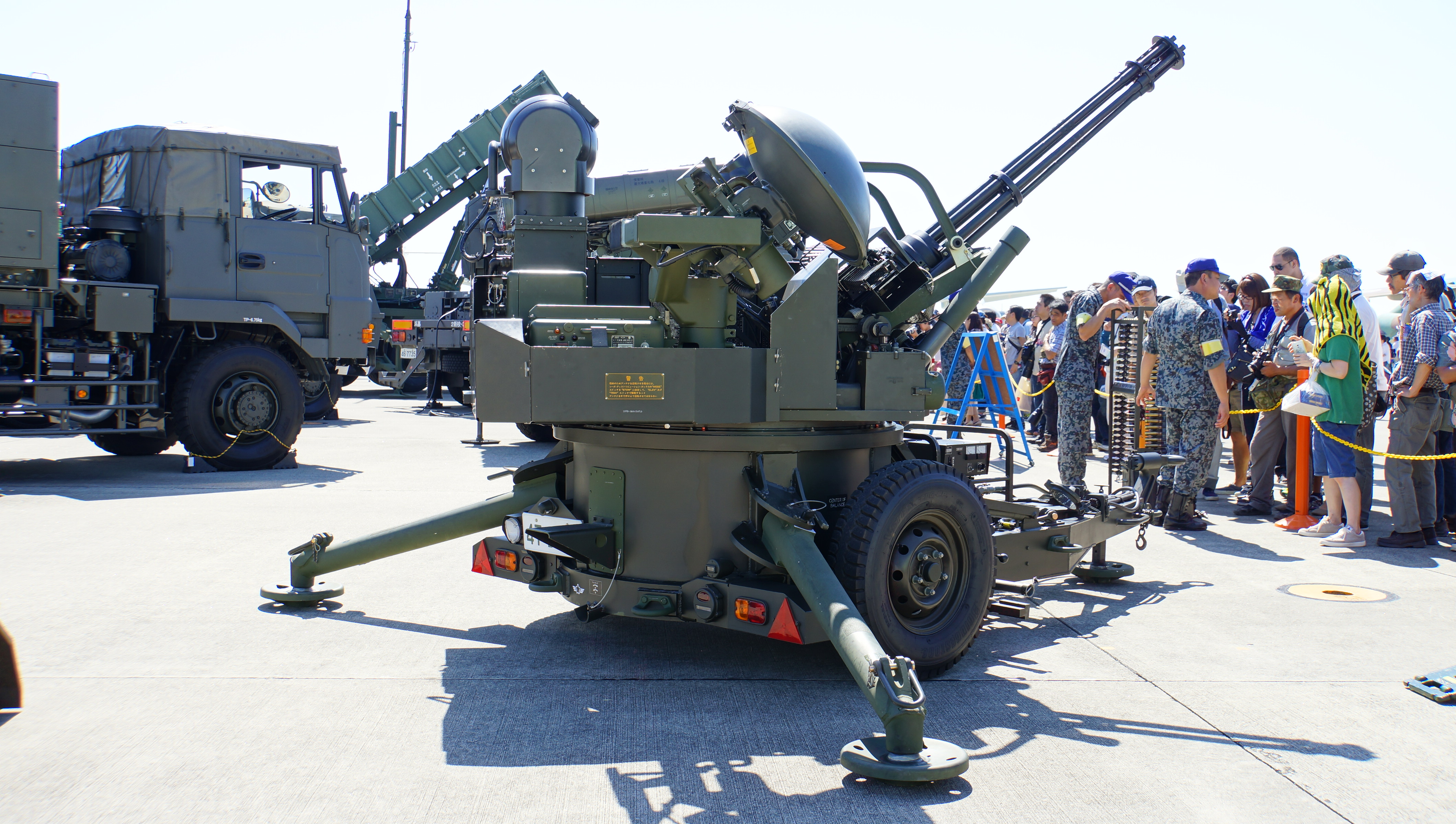 航空自衛隊 VADS-1改。 14年9月28日 浜松基地にて。